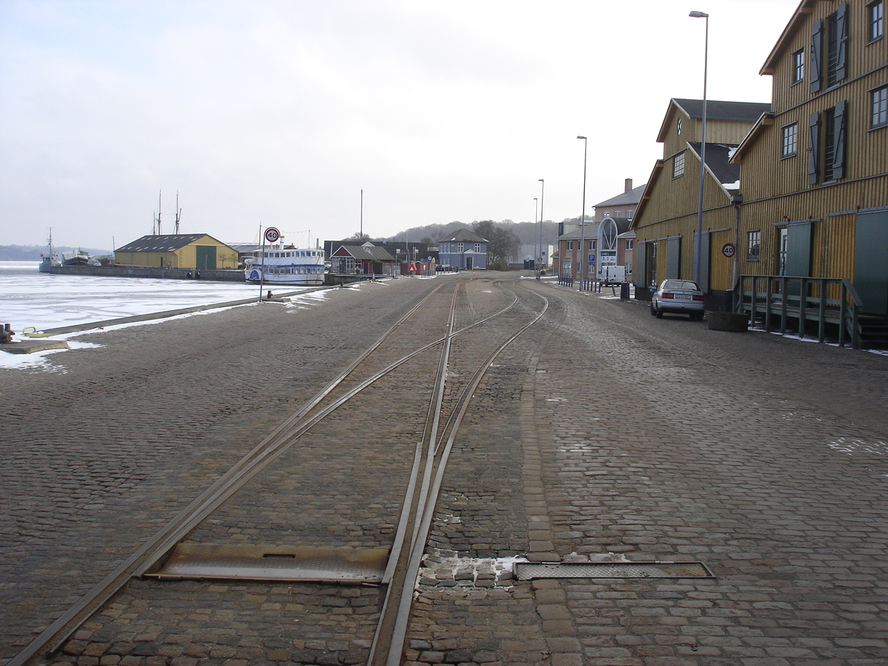 Hobro Havnebanes to spor findes stadig på Søndre Kajgade